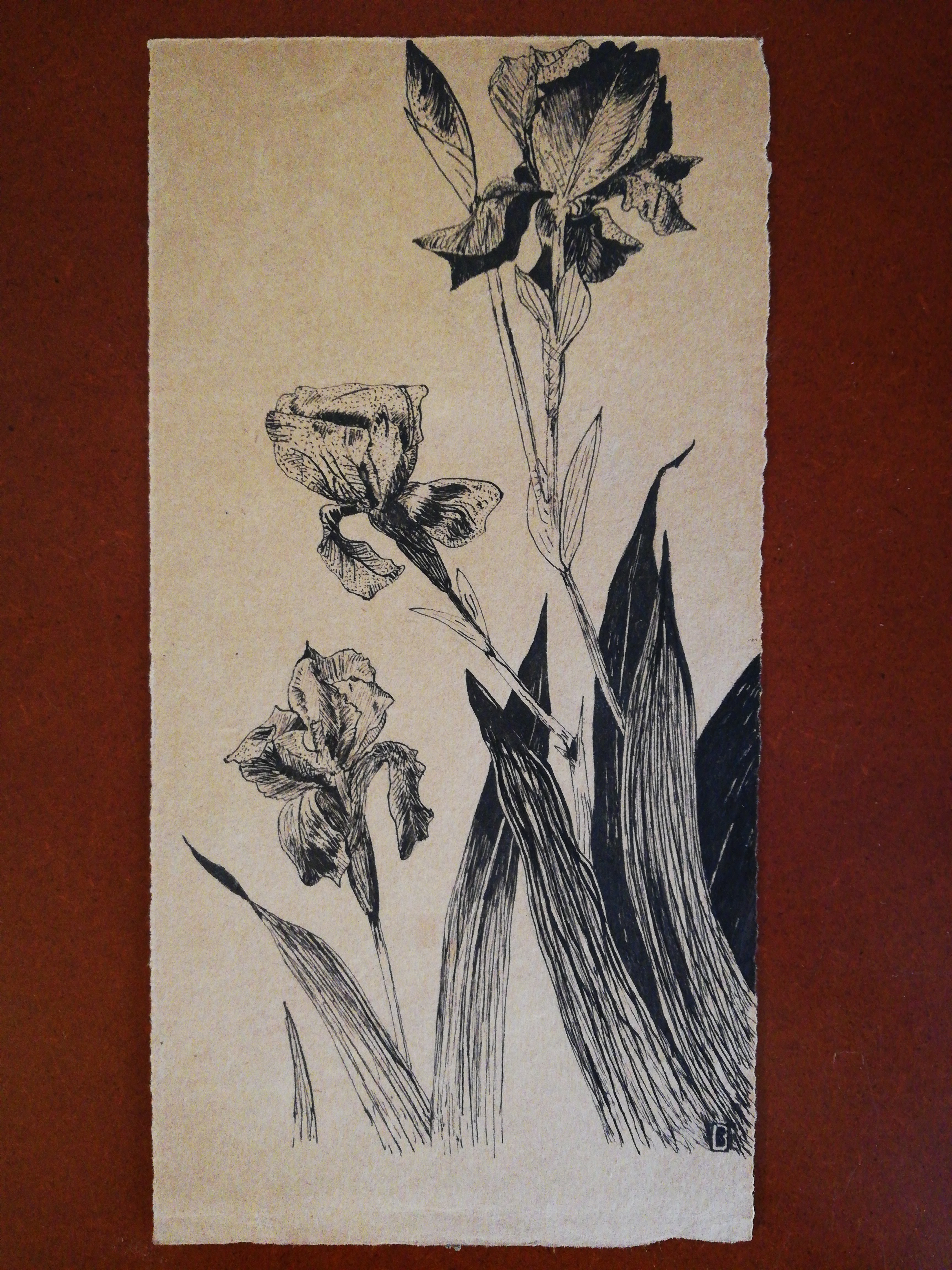 Représentation amateure de fleurs d'Iris.